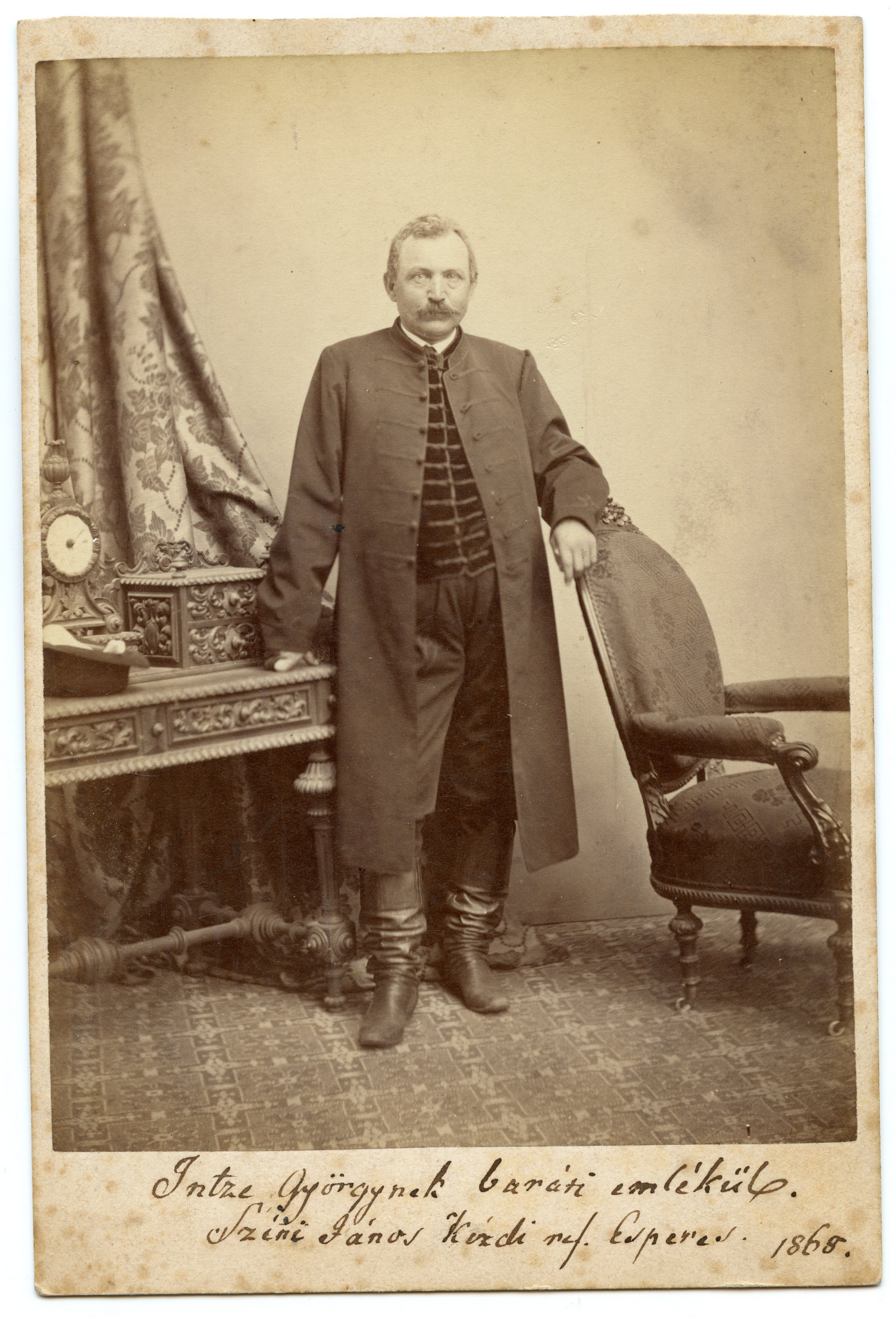 Szini János Kézdi református esperes 1868. a Sepsiszentgyörgyi Mikó Kollégium Communitas elnöke